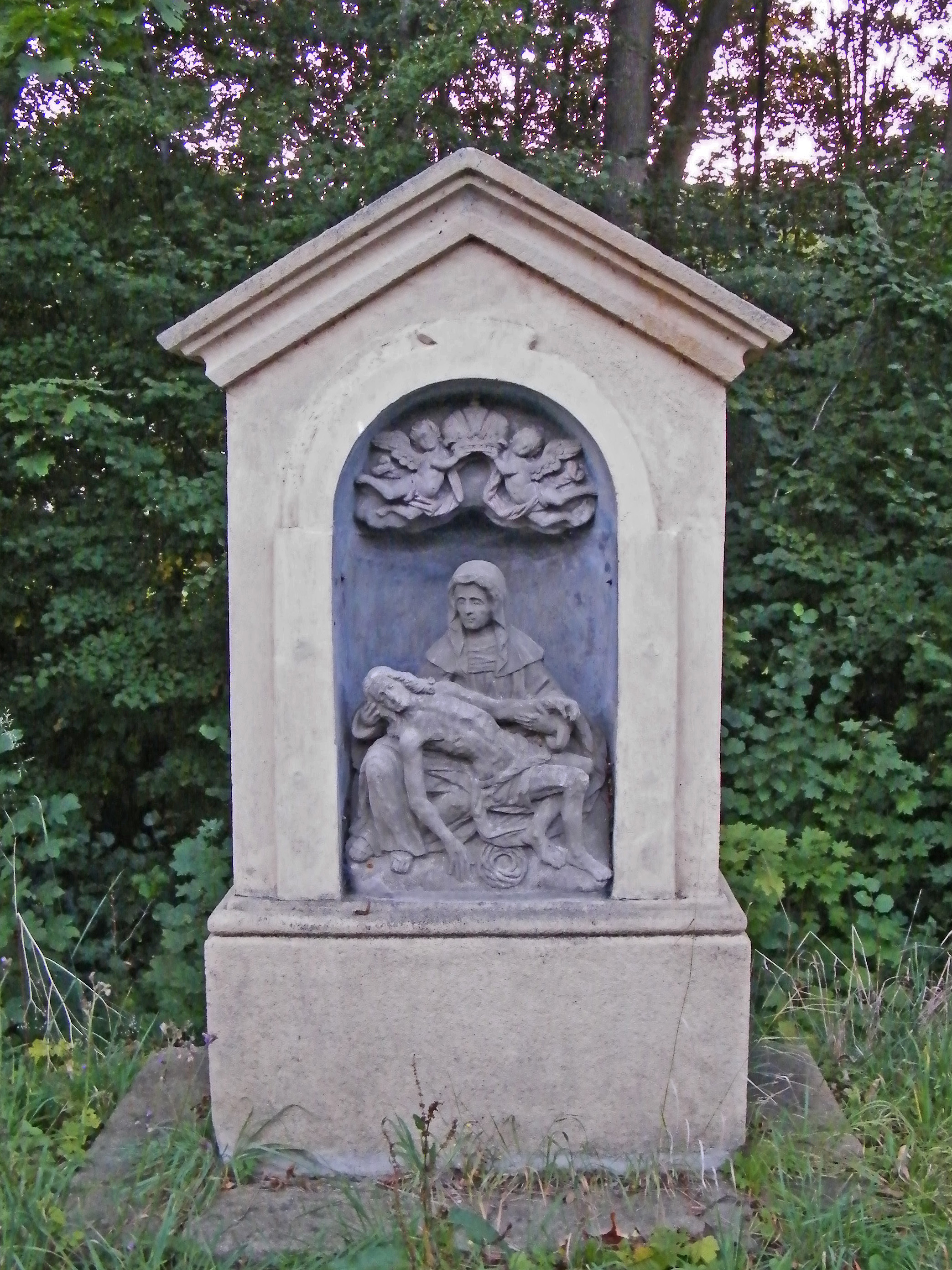 Výklenková kaple se sochou Piety v Rožanech